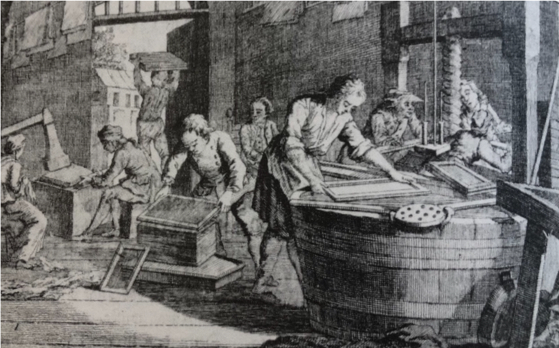 A gauche, le marteau à lisser ou martinet. Gravure allemande, Leizpig 1761